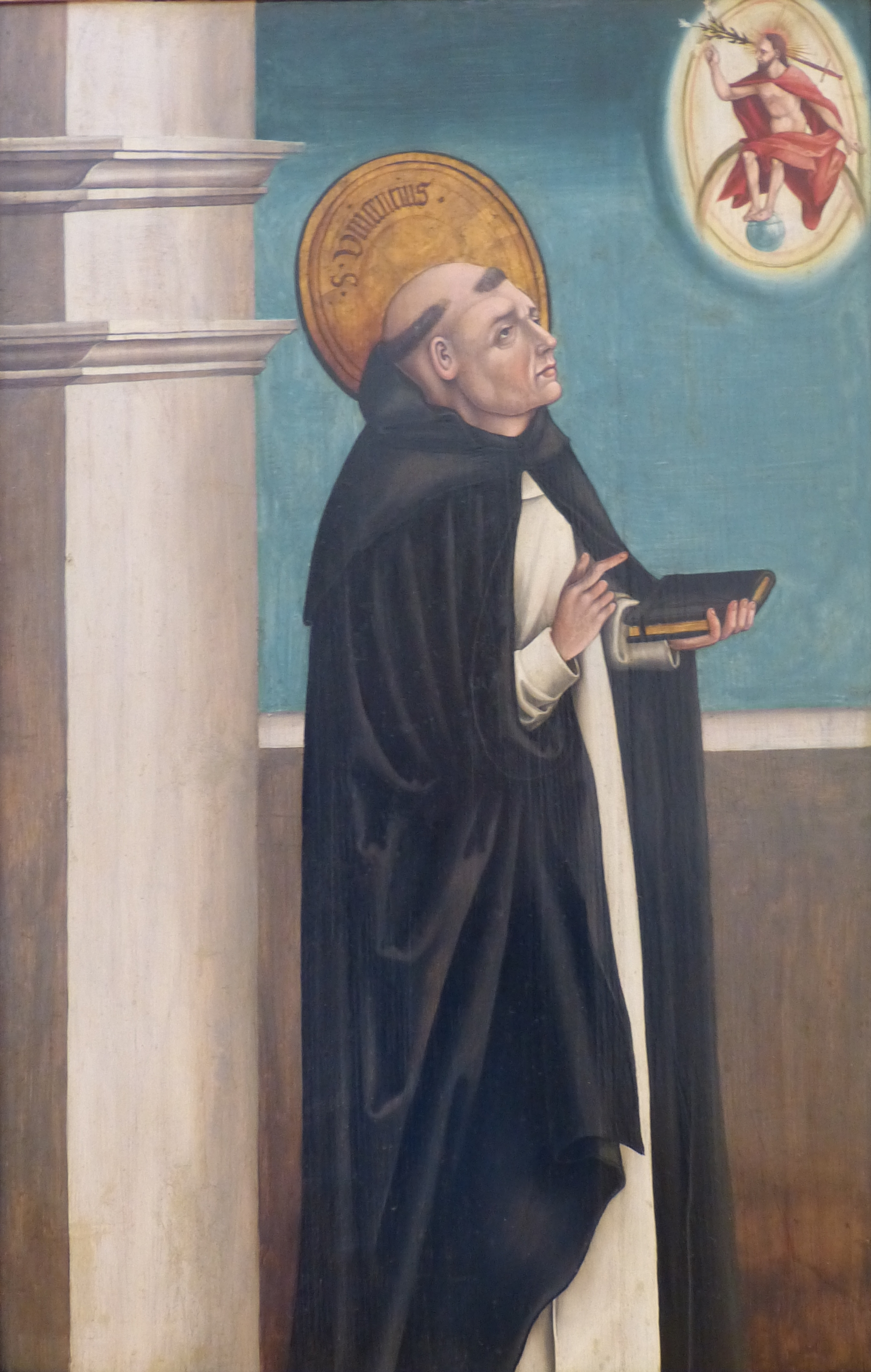 Schaezlerpalais, Augsburg, Bayern